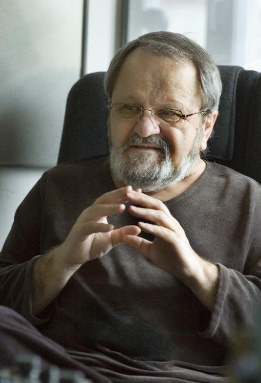 Jiří Jun, český výtvarník, grafik a kreslíř